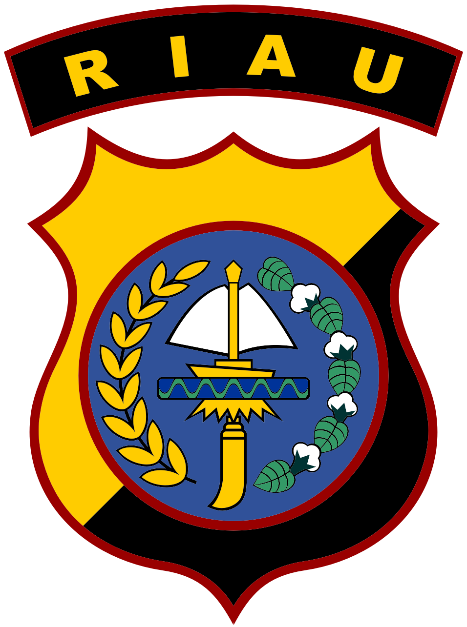 Gambar ini adalah Lambang Kepolisian Daerah Riau